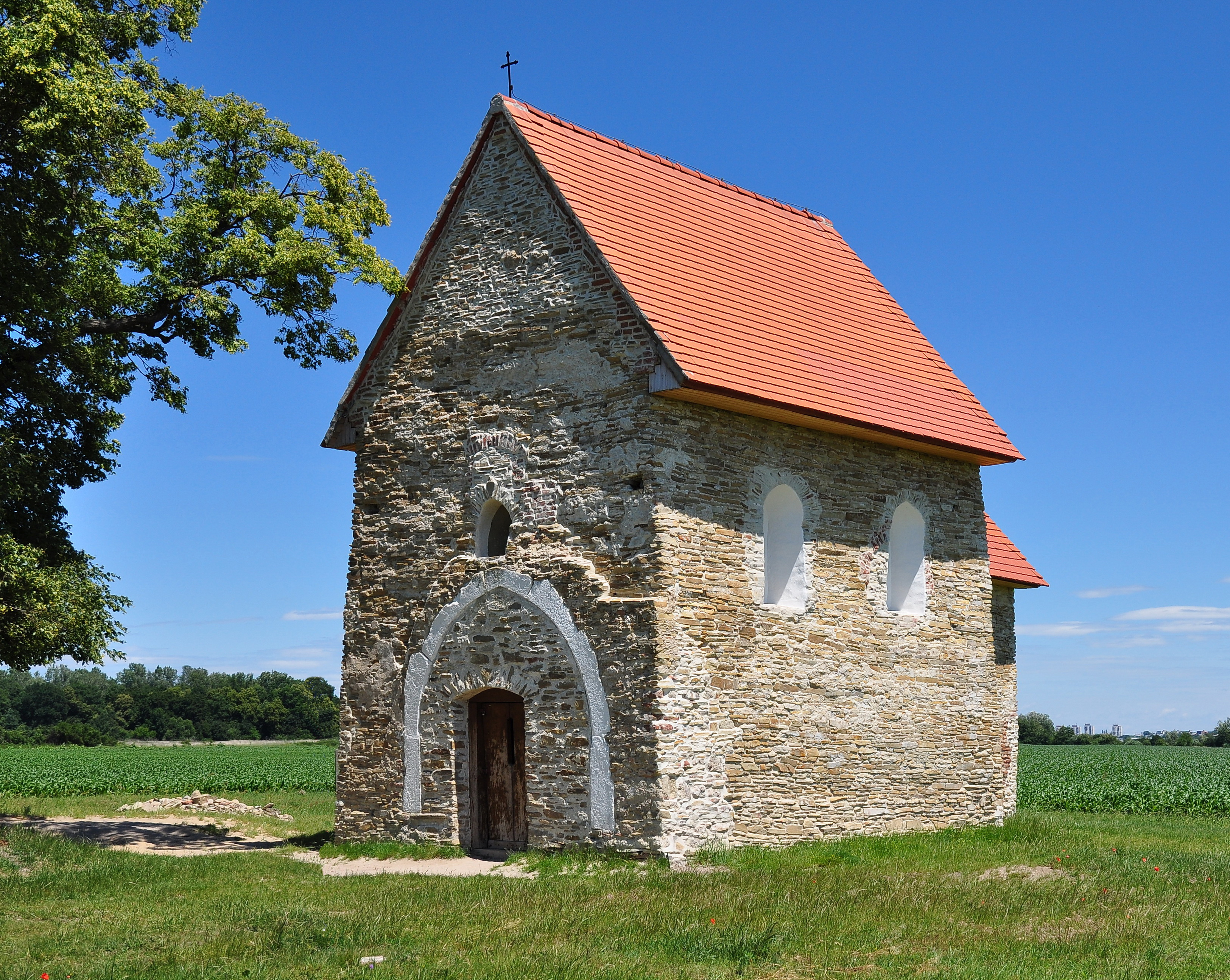 Kopčany, Slovensko